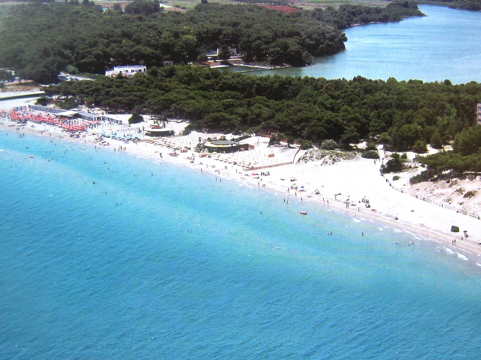 Laghi Alimini Otranto